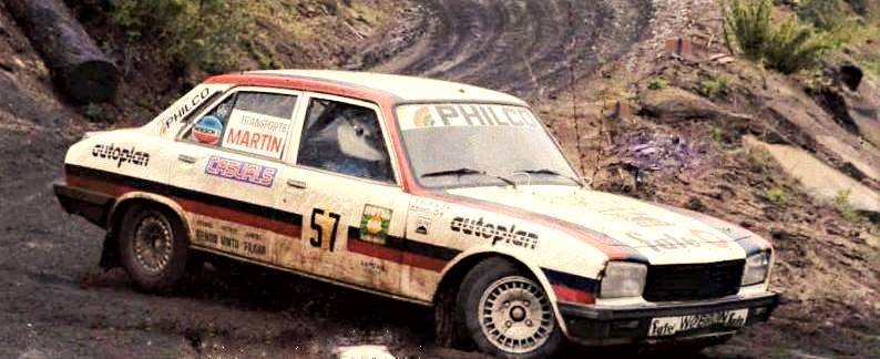 Cocho López en el Rally Argentina 1984, sobre un Peugeot 504.